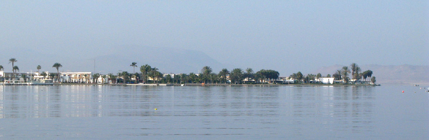 Balneario de Paracas en la bahía del mismo nombre. Un lugar de espectacular belleza que colinda con la Reserva Nacional de Paracas